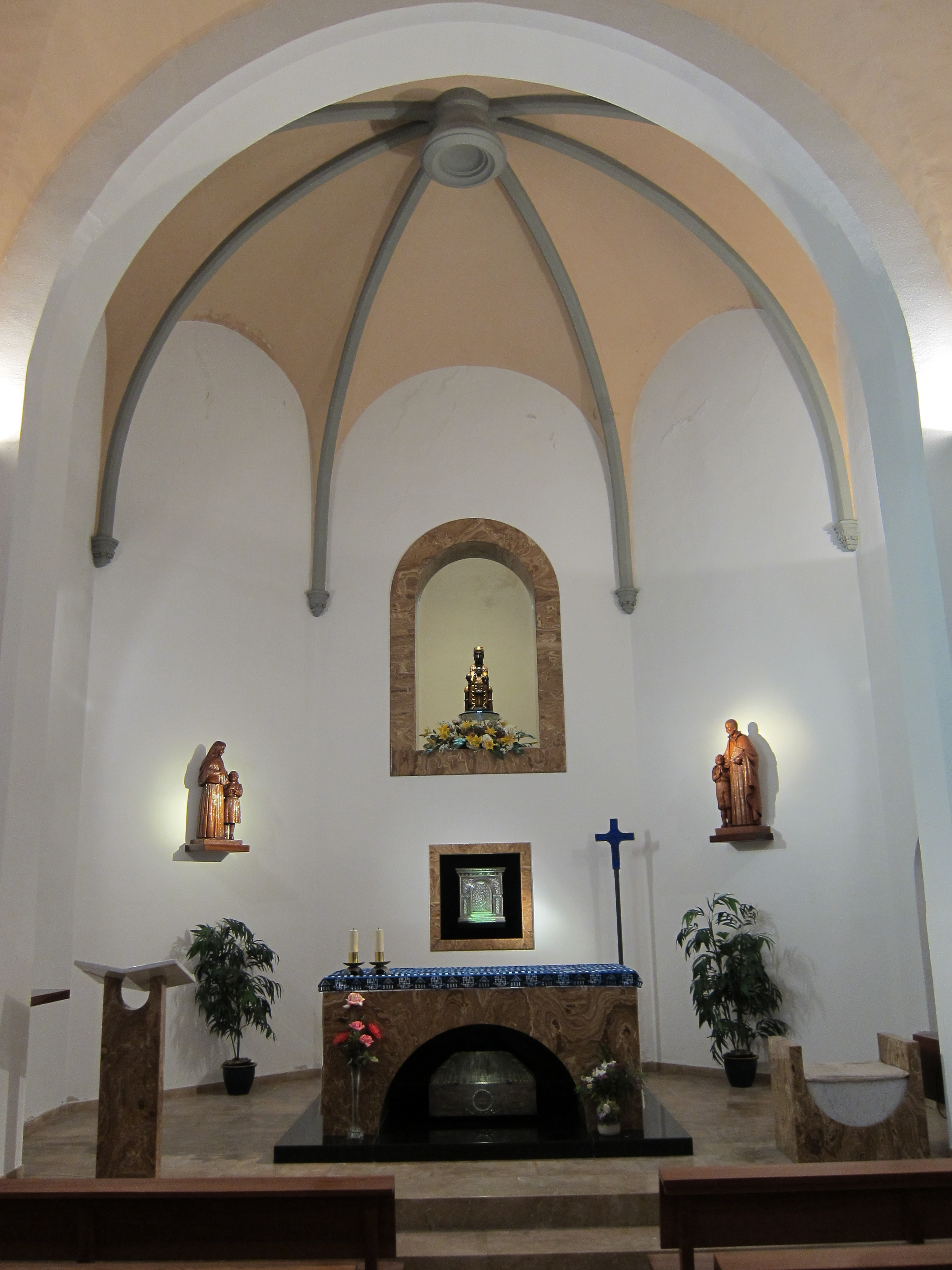 Església del Convent de les Escolàpies (Olesa de Montserrat)